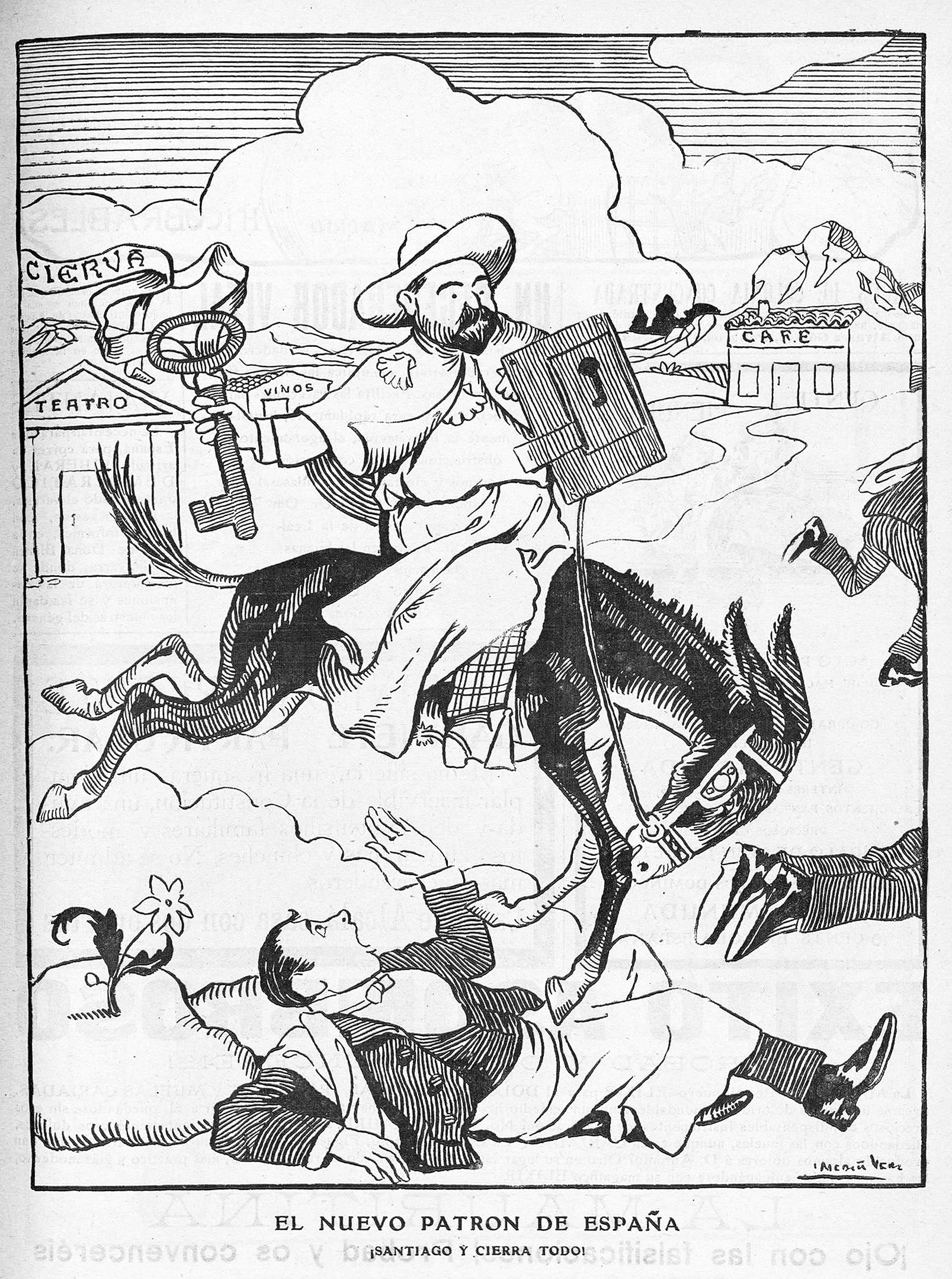 El nuevo patrón de España. ¡Santiago y cierra todo!.